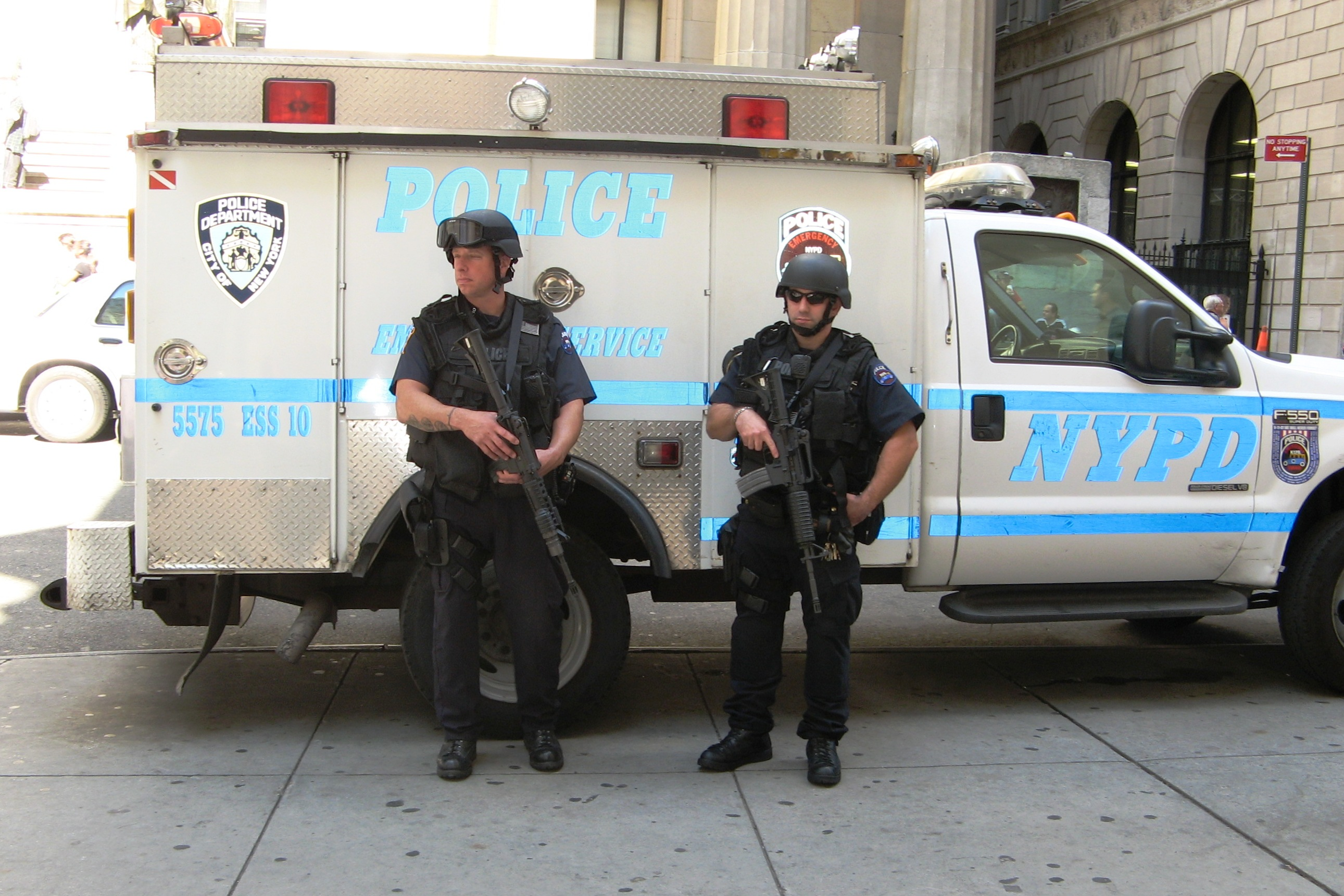 שוטרים חמושים ליד וול סטריט